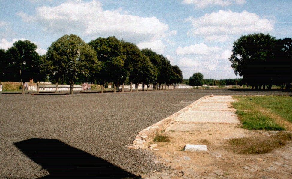 Mahn- und Gedenkstätte KZ Ravensbrück - Blick auf das Gelände des Frauenlagers